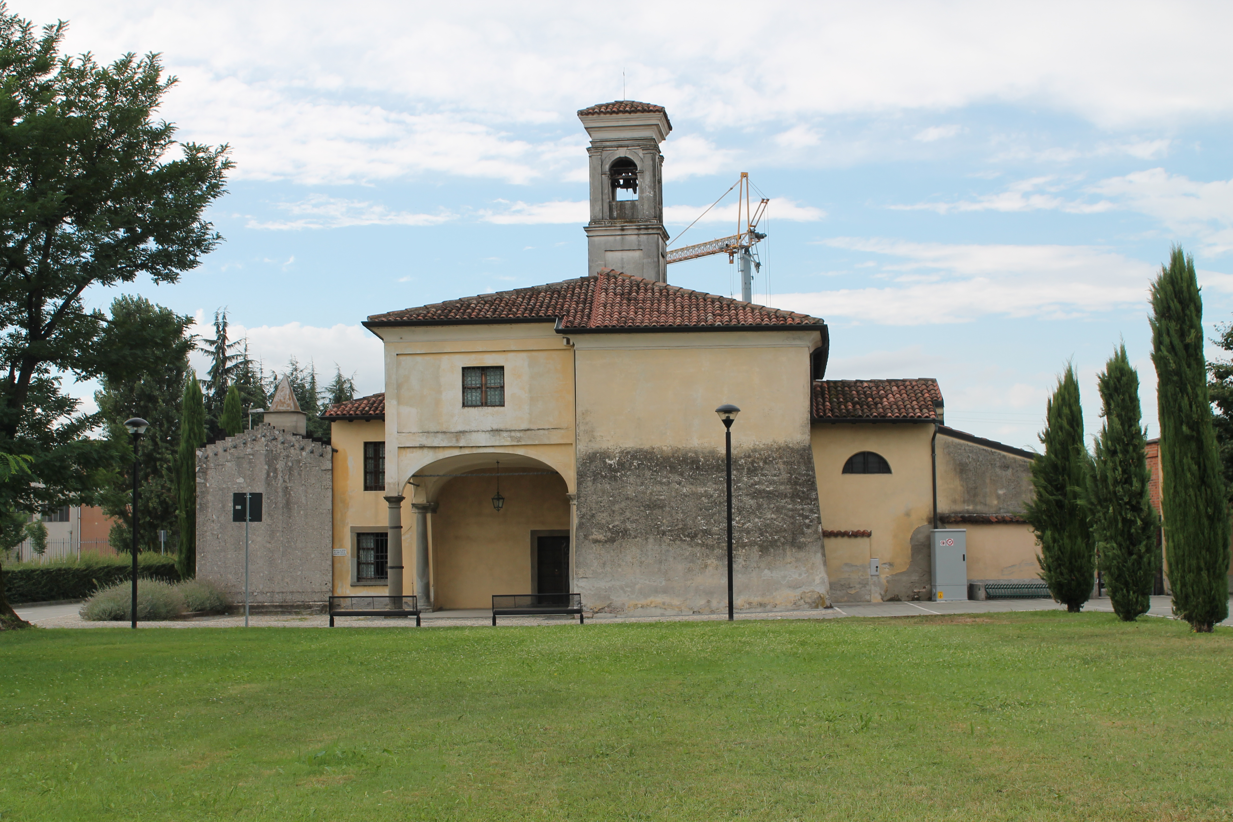 Chiesa di S. Marino. Castelcovati, BS.